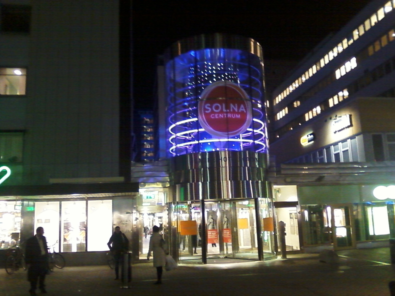 Solna Centrums huvudentré.